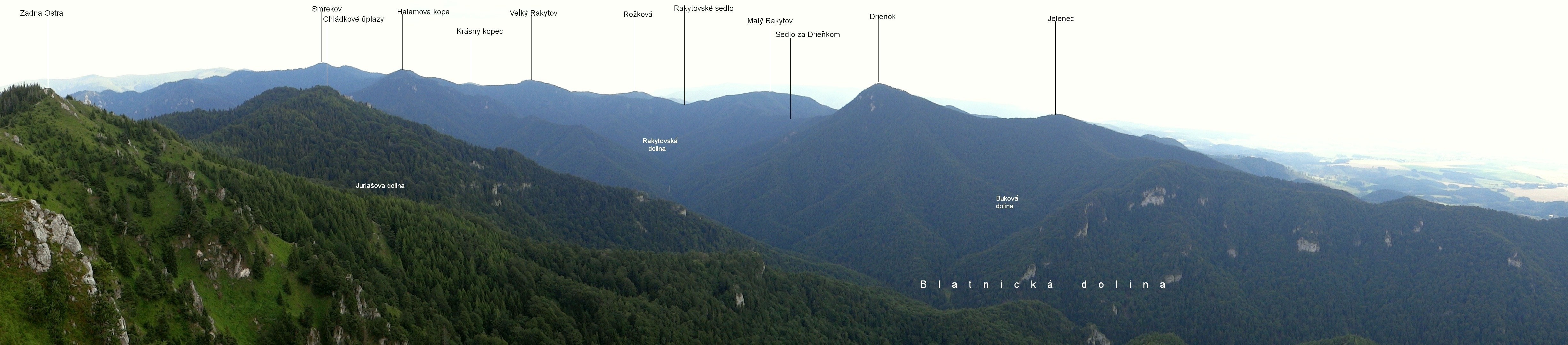 Ostrá - panorama